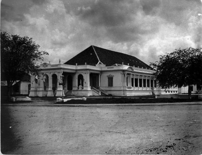 Foto. Schouwburg te Batavia.